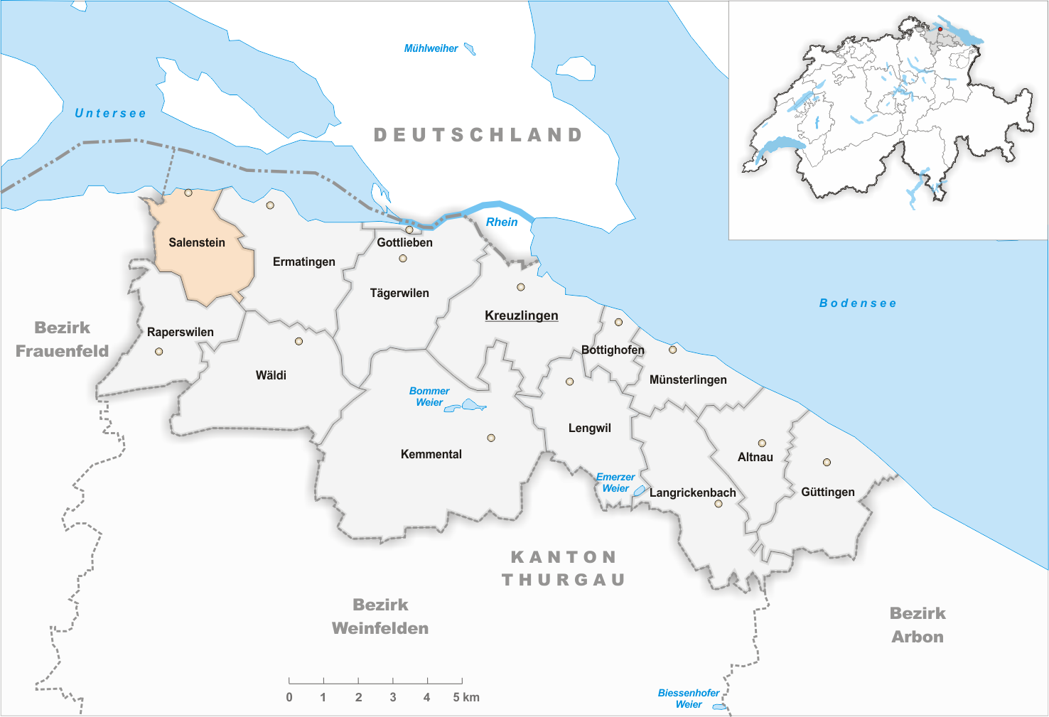 Municipality Salenstein